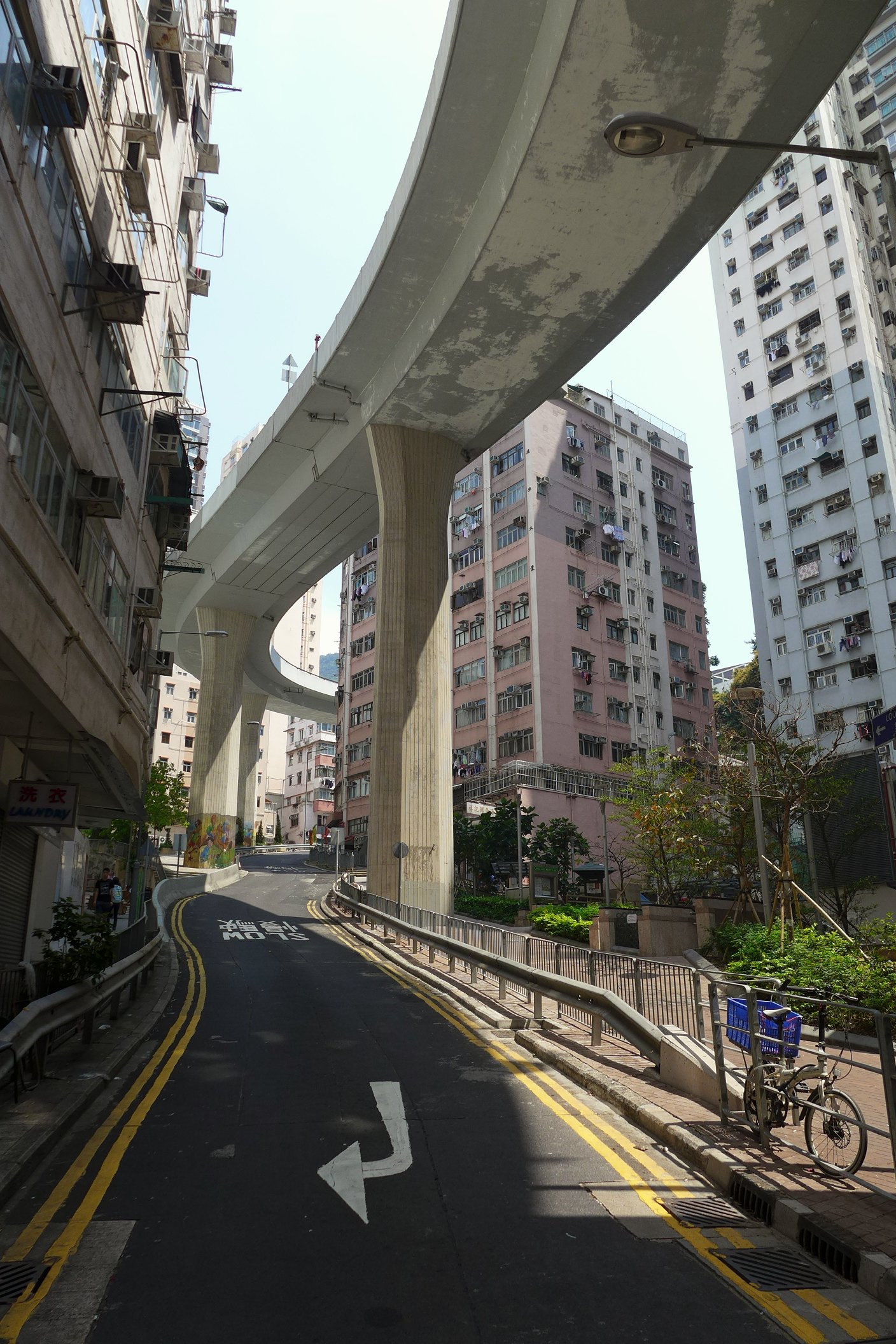 Hill Road, Hong Kong